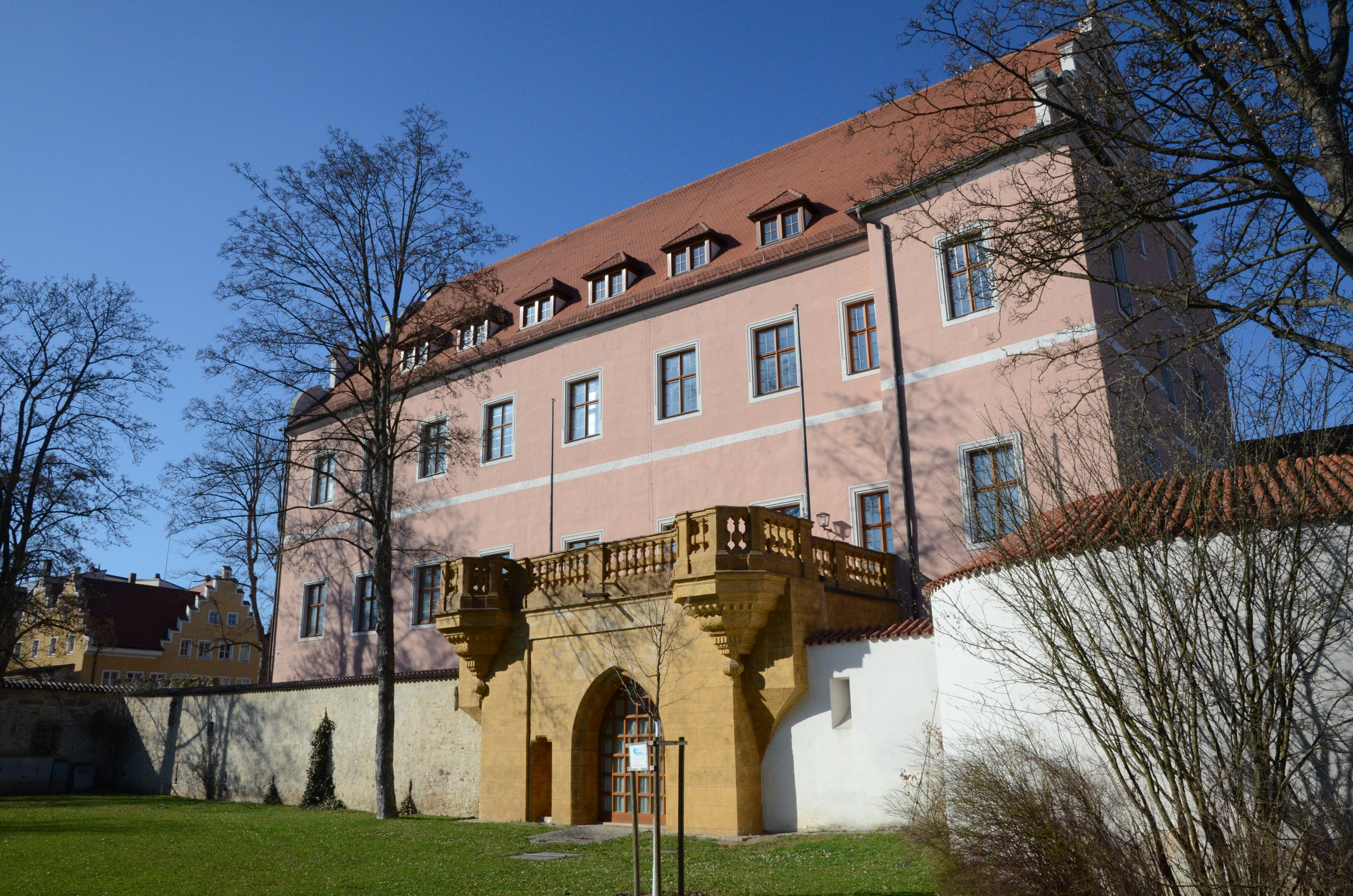 Amberg ehem. kurfürstliches Schloss